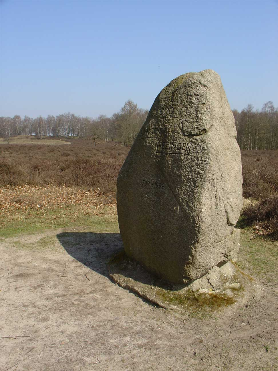 Grensteen tussen Hesingen en Hezingen